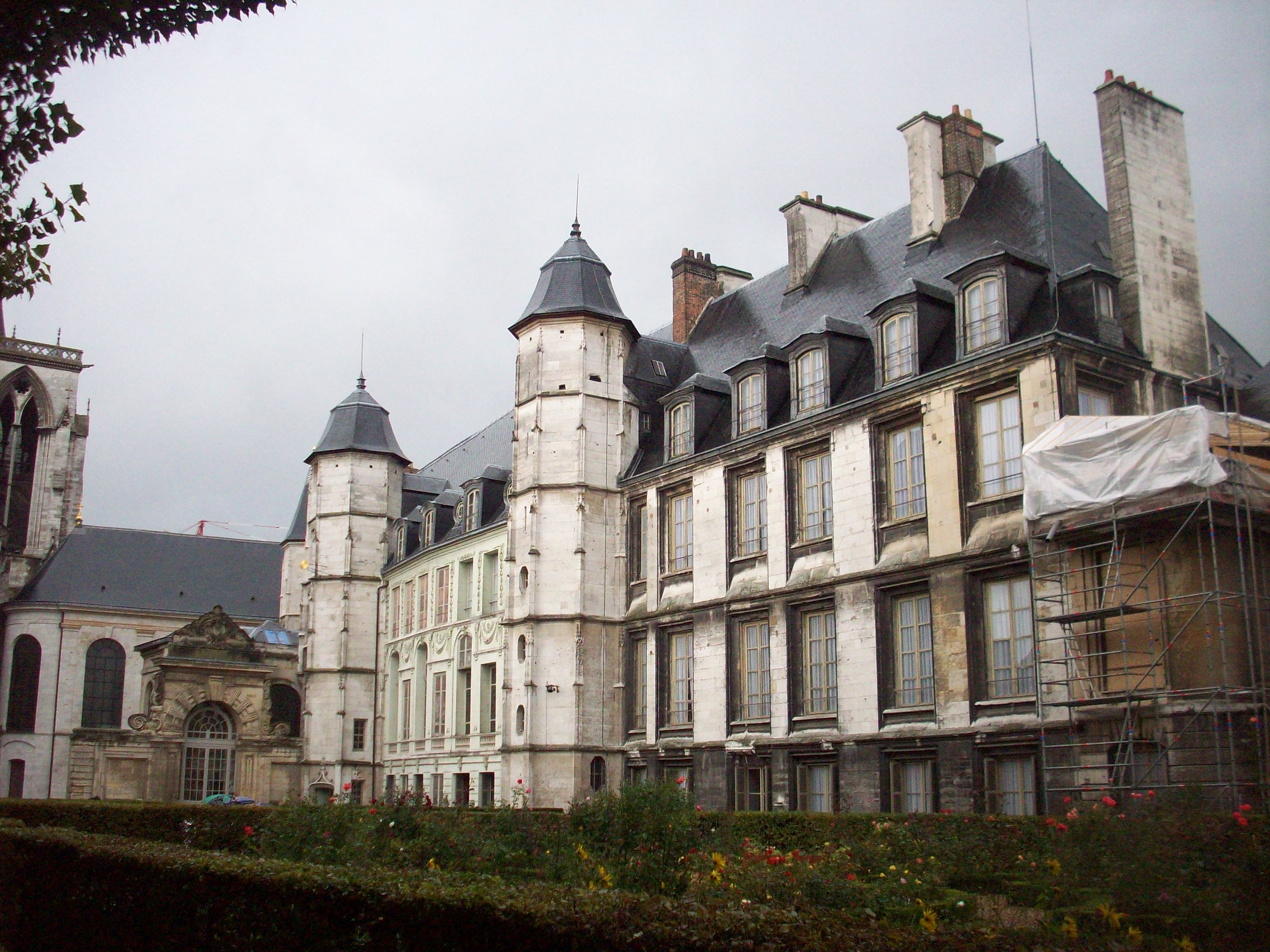 Archevêché avec le manoir d'Amboise sur la droite.